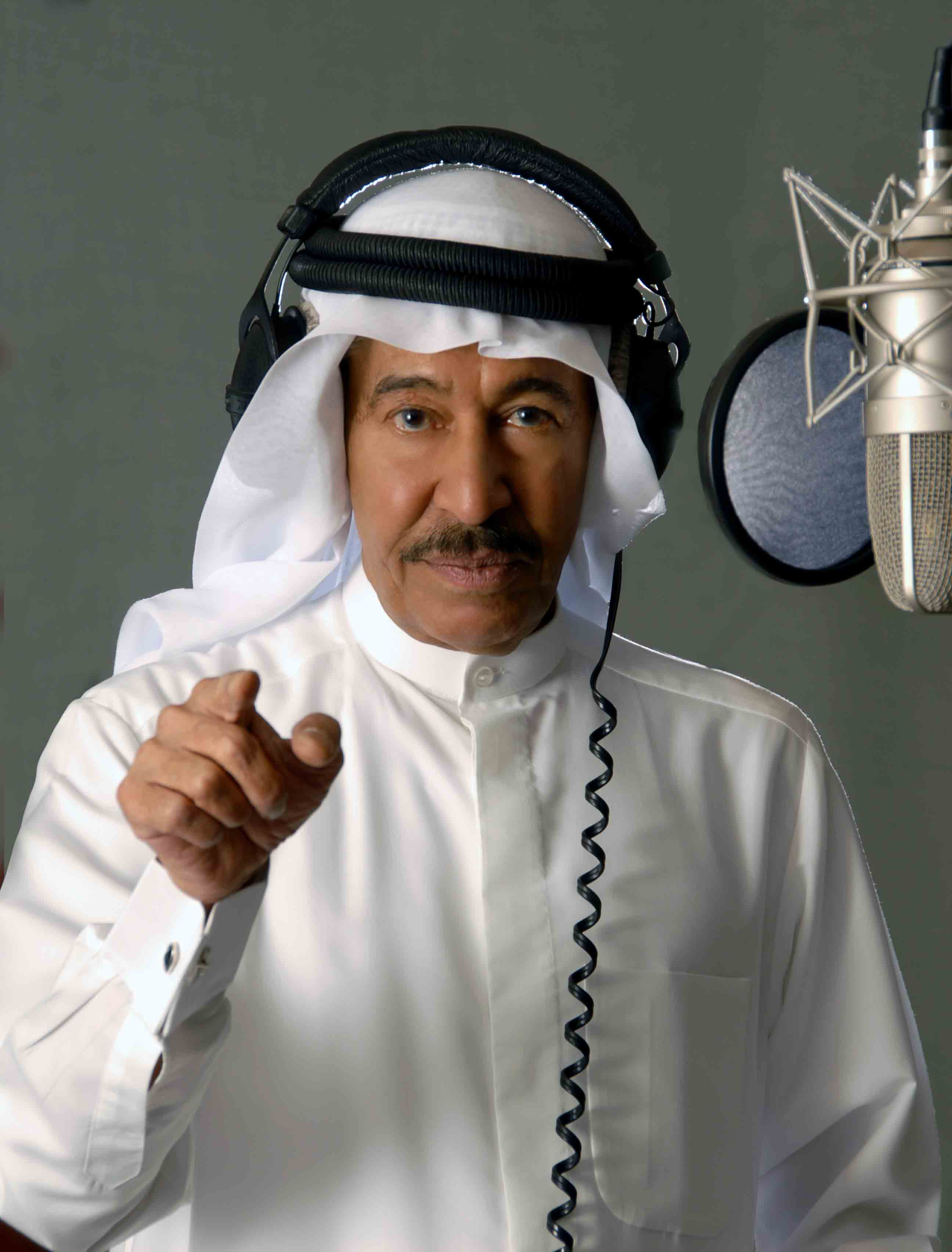 Abdel Karim Abdel Kader, is a popular Arab singer from Kuwait.